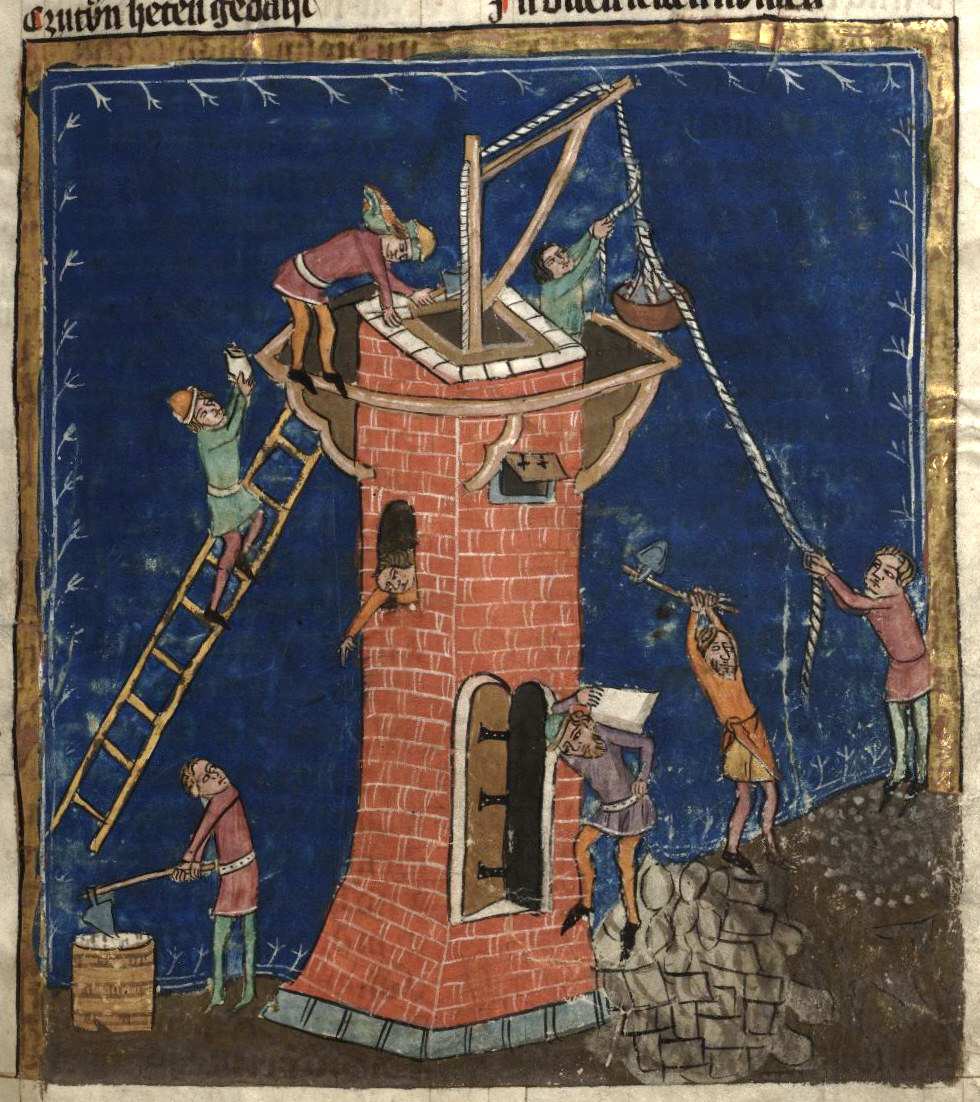 Rudolf von Ems: Weltchronik. Böhmen (Prag), 3. Viertel 14. Jahrhundert. Hochschul- und Landesbibliothek Fulda, Aa 88. Bildbeschreibung nach Martin Roland. Miniatur 10 16r Turmbau zu Babel